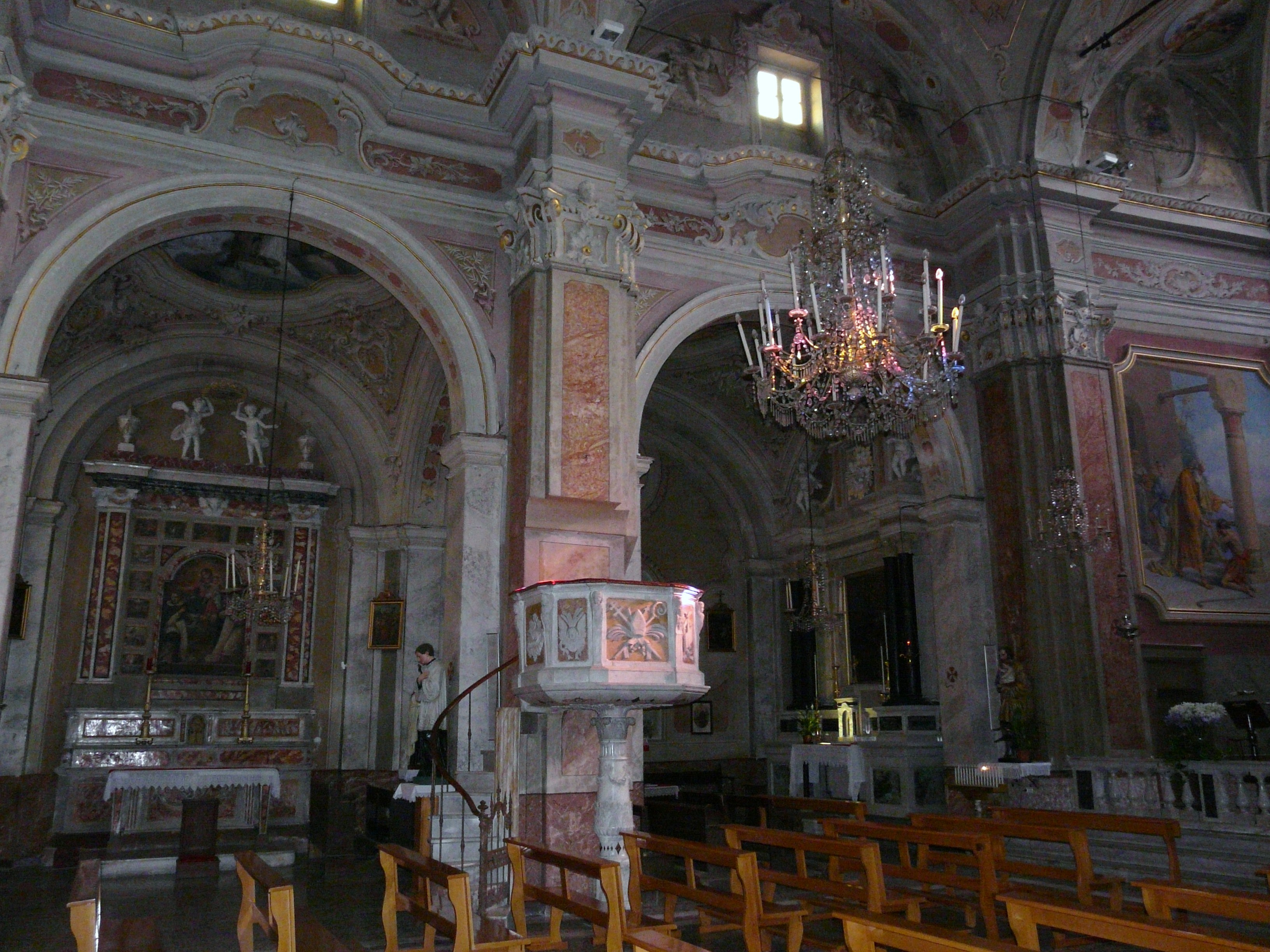 Interni della chiesa dei santi Filippo e Giacomo, Airole, Liguria, Italia